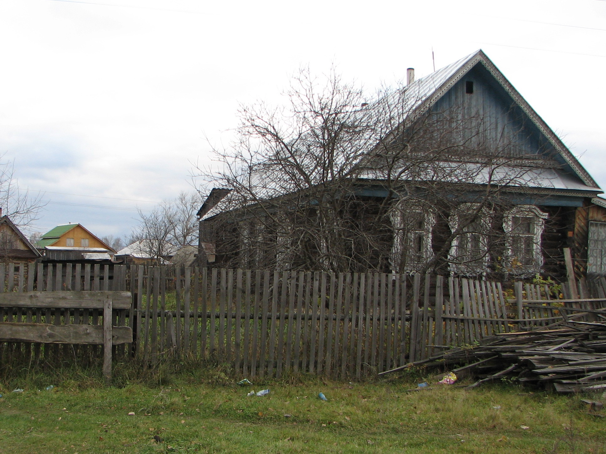 Дом на ул. Школьная в селе Ломовка Кулебакского района Нижнего Новгорода